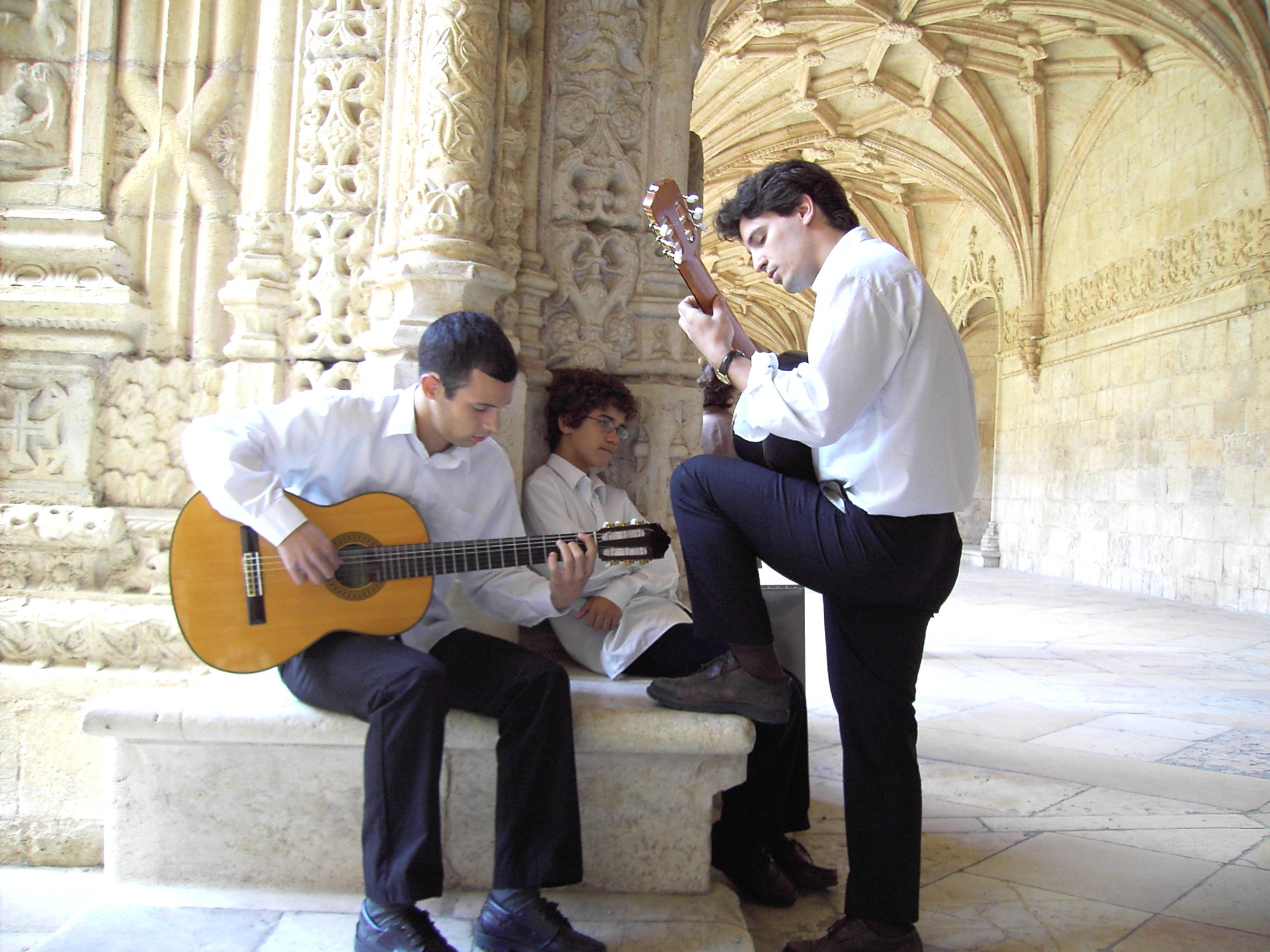 maggio 2005, Lisboa los Jeronimos - prove di fado